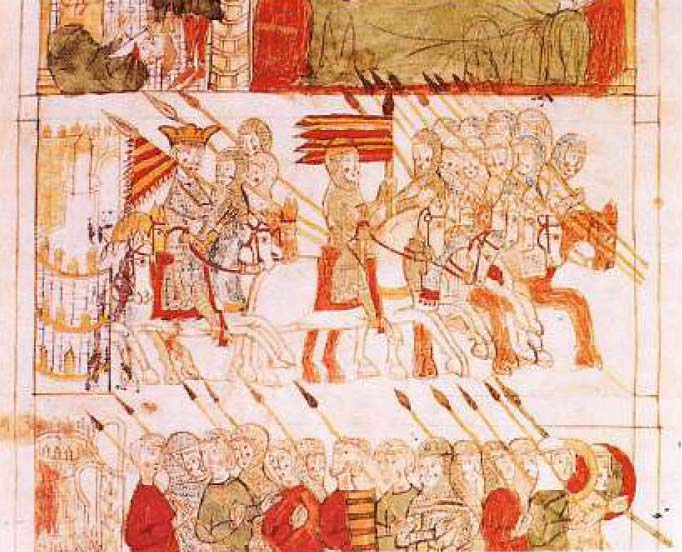 Codex Calixtinus (Liber Sancti Jacobi), f. 90, ms.2631, Biblioteca General Histórica de la Universidad de Salamanca Representa la aparición de Santiago en sueños a Carlomagno y la decisión de éste de acudir con sus tropas a la reconquista de la península para liberar del invasor musulmán el camino de Santiago. La miniatura se divide en tres registros que han de leerse de arriba hacia abajo. En la parte superior, Santiago se acerca al lecho de un dormido Carlomagno, acostado con su corona, y una cartela que cuelga del brazo del apóstol y une a ambos personajes se utiliza para comunicarle su deseo de que libere su patria de la dominación islámica. A la izquierda, fuera del recinto en que descansa Carlomagno, añade el miniaturista la matanza de cristianos a manos de los infieles, escena que le señala Santiago con su mano derecha. En los dos registros siguientes se representa la salida de Aquisgrán del propio Carlomagno rodeado de sus caballeros, y precedido de las tropas y de Roldán, que porta el estandarte del monarca, repetido al lado de Carlomagno. Abajo se dispone el diálogo de los soldados. Fuente de la descripción: La miniatura y el grabado de la Baja Edad Media en los archivos españoles, p. 144.